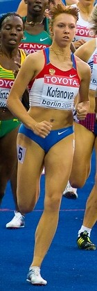 Elena Kofanova, Berlin 2009